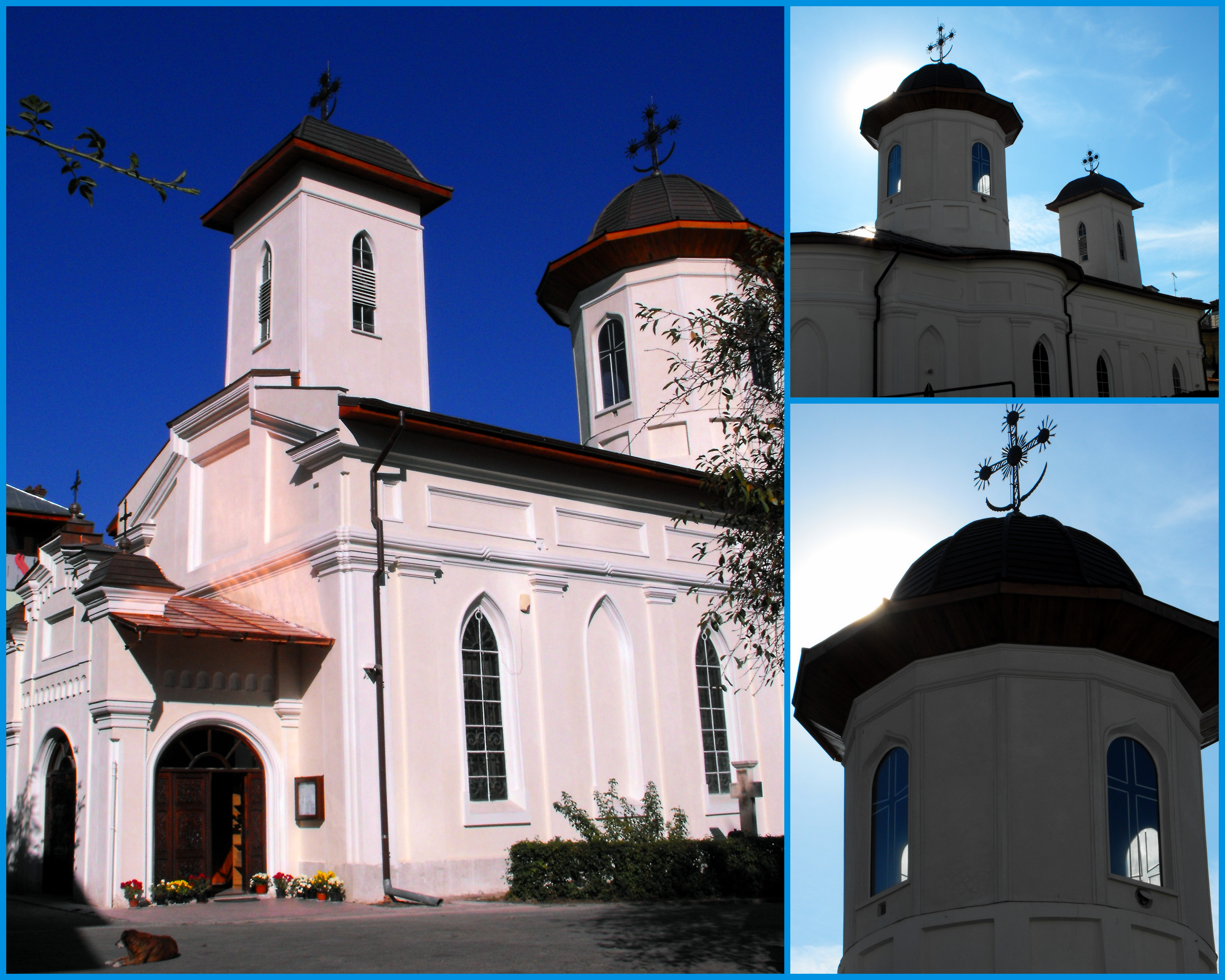 Biserica Sf. Nicolae Buzești